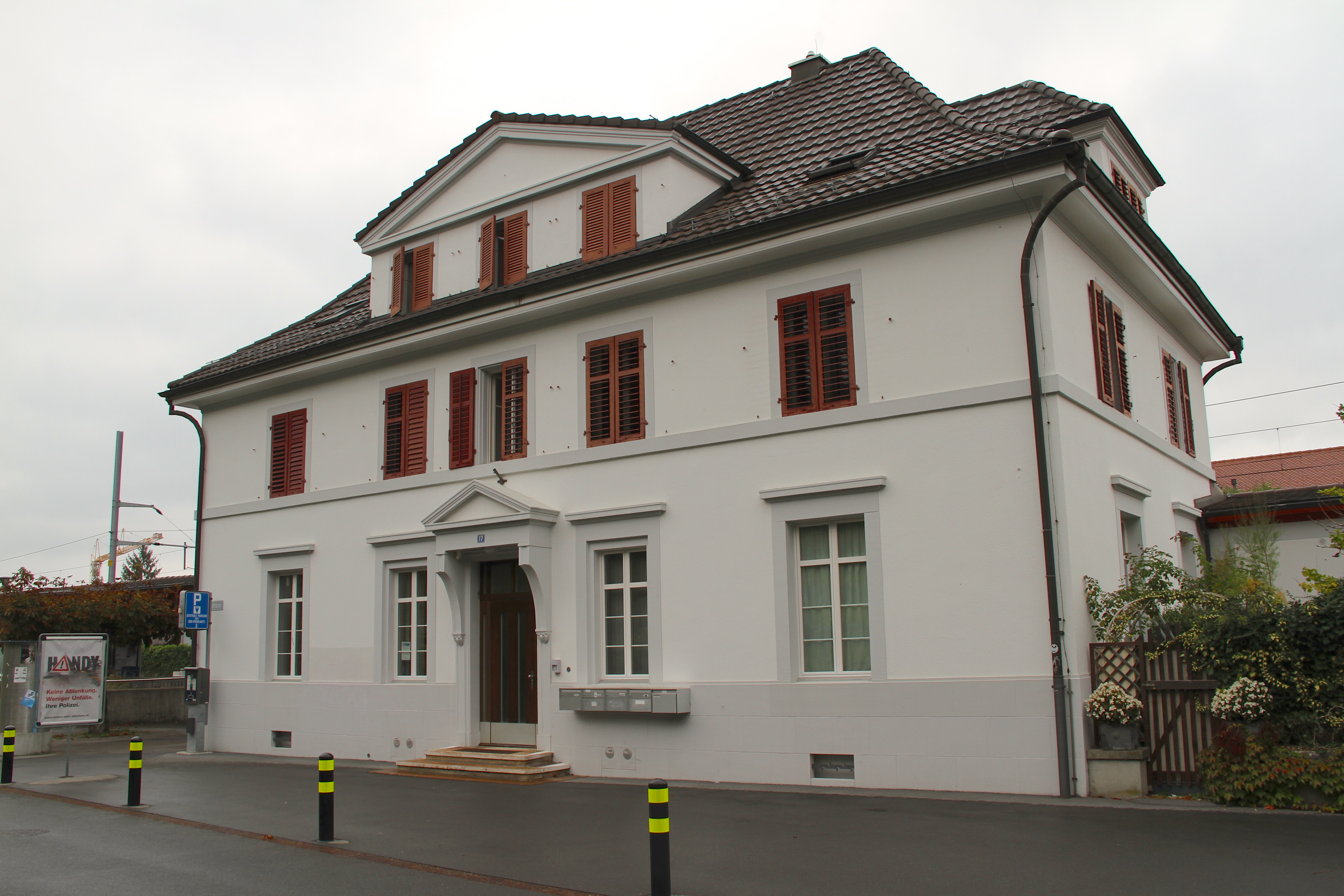 Bahnhof Oberrieden, Aufnahmegebäude, ID 13700179